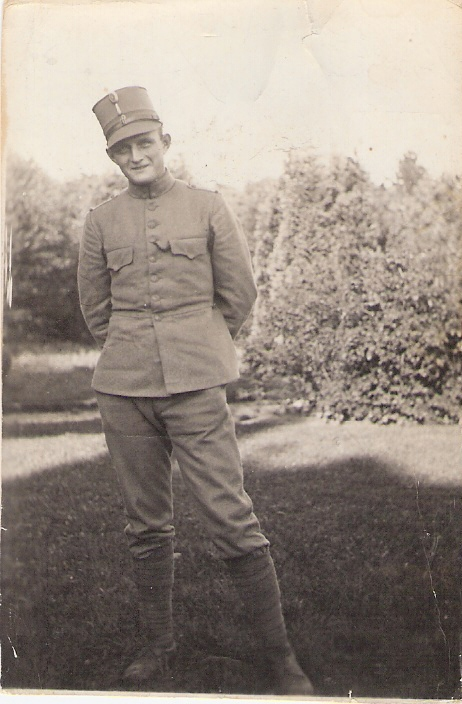 Jan Emmer in 1938.